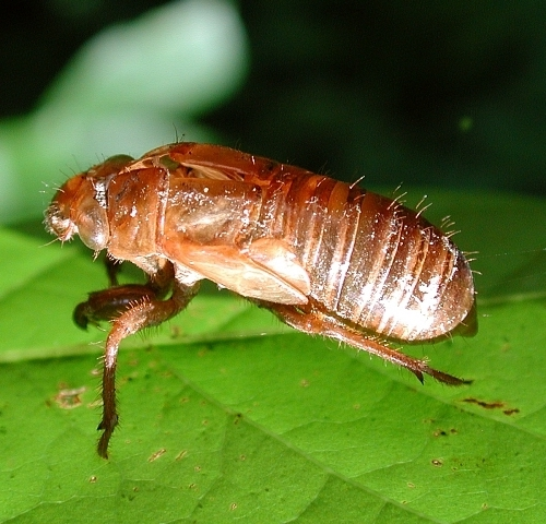 Exuvia of Magicicada septendecim, 17-year-periodical cicada, 17-Jahr-Zikade, Baltimore, USA